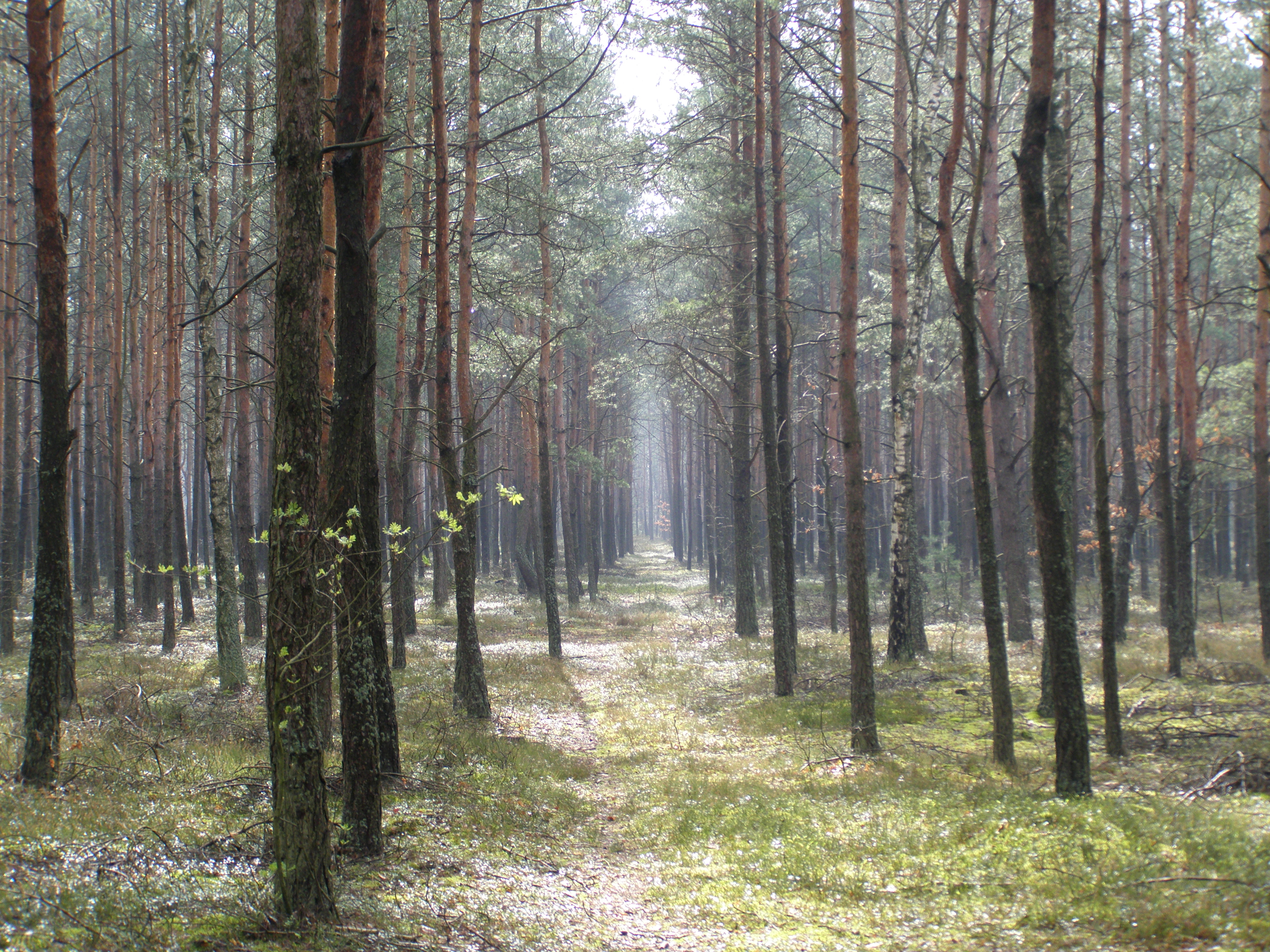 Las mieszany, młody, Mazowsze